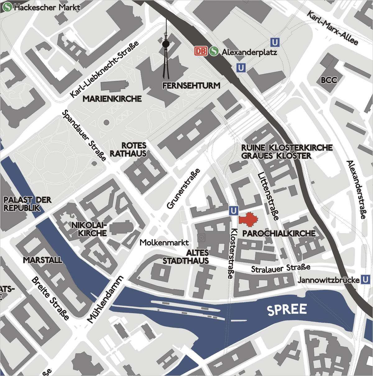 Lageplan der Parochialkirche in Berlin Mitte